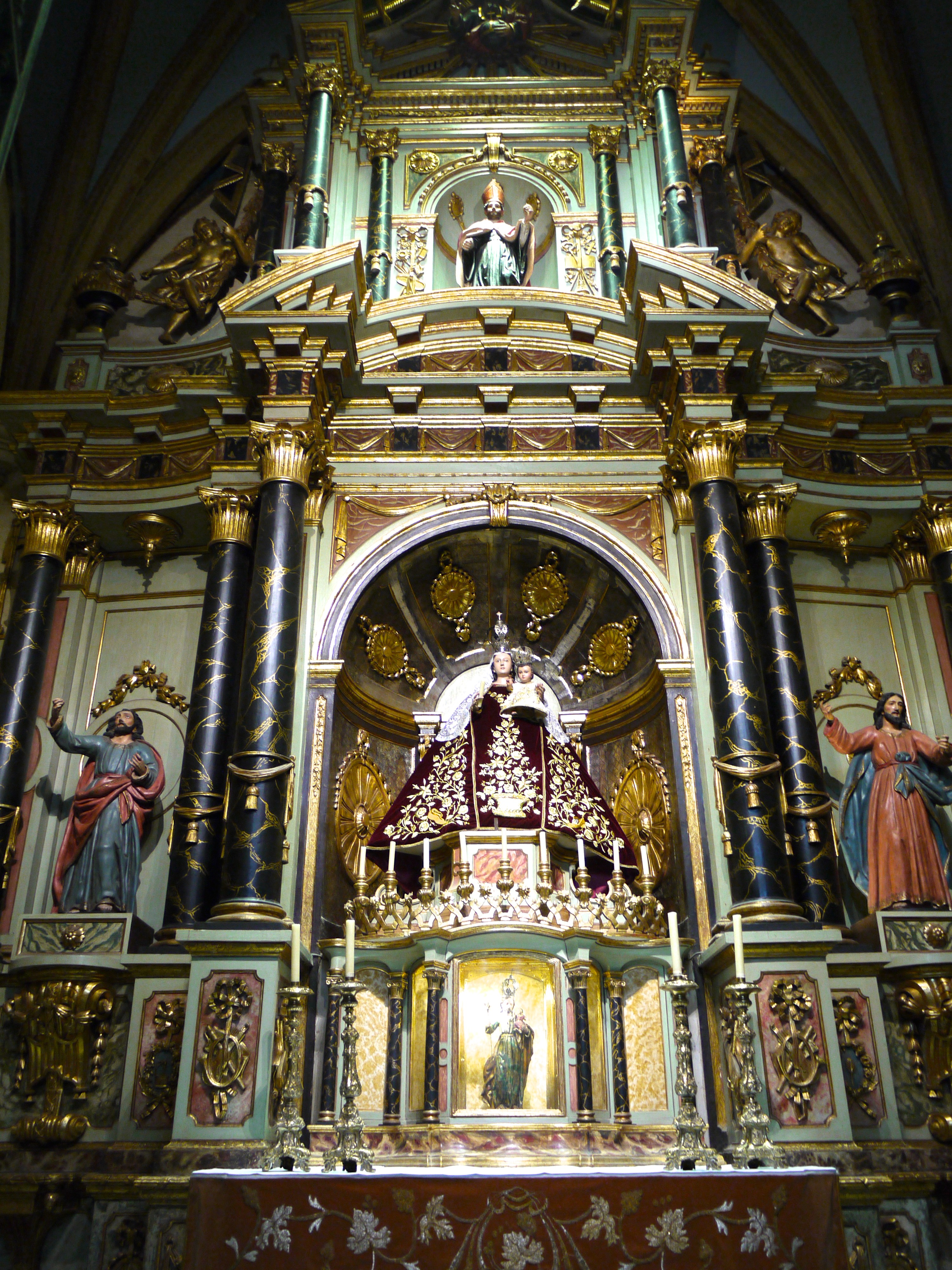 P1030129 Pérou, Lima, Catedral San Juan Evangelista, la chapelle de Nuestra Señora de La Candelaria